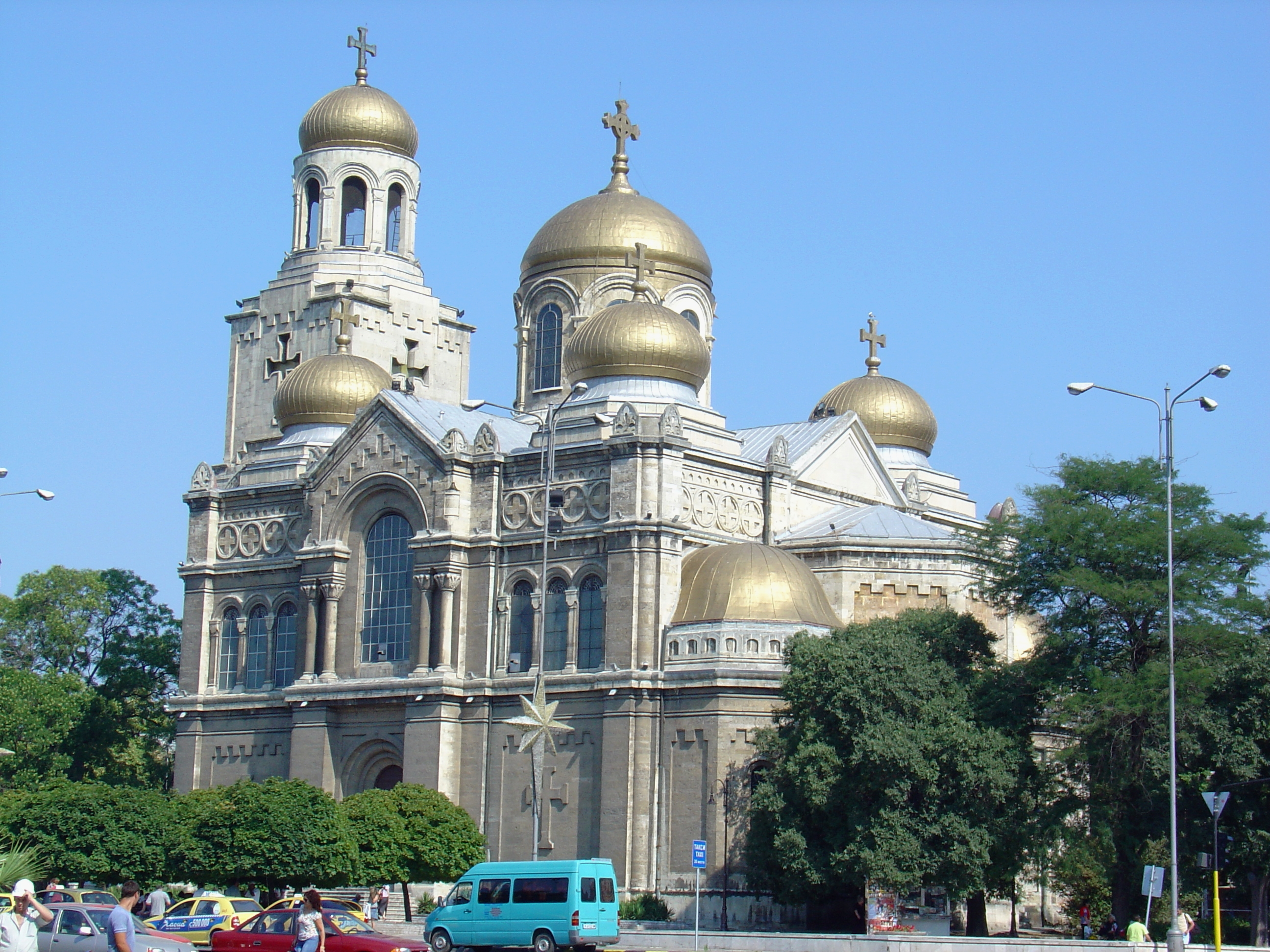 Cathédrale de l'Assomption - Varna (Bulgarie). Copie de la cathédrale de Saint-Pétersbourg construite en 1886, cette cathédrale possède une superbe collection d'icônes et de fresques dont la plupart ont été réalisées après la seconde guerre mondiale